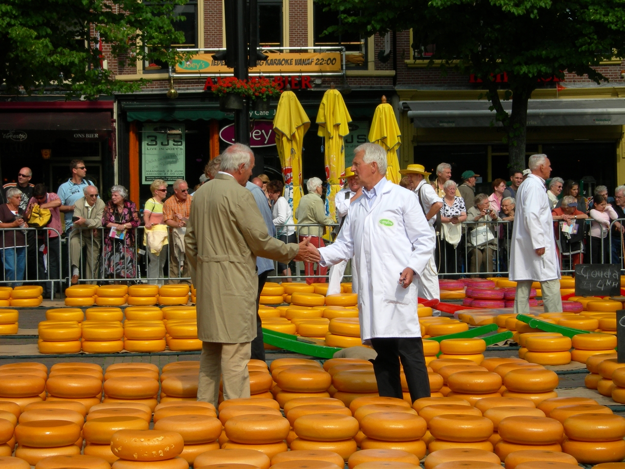 Kéismaart zu Alkmaar, Juni 2008